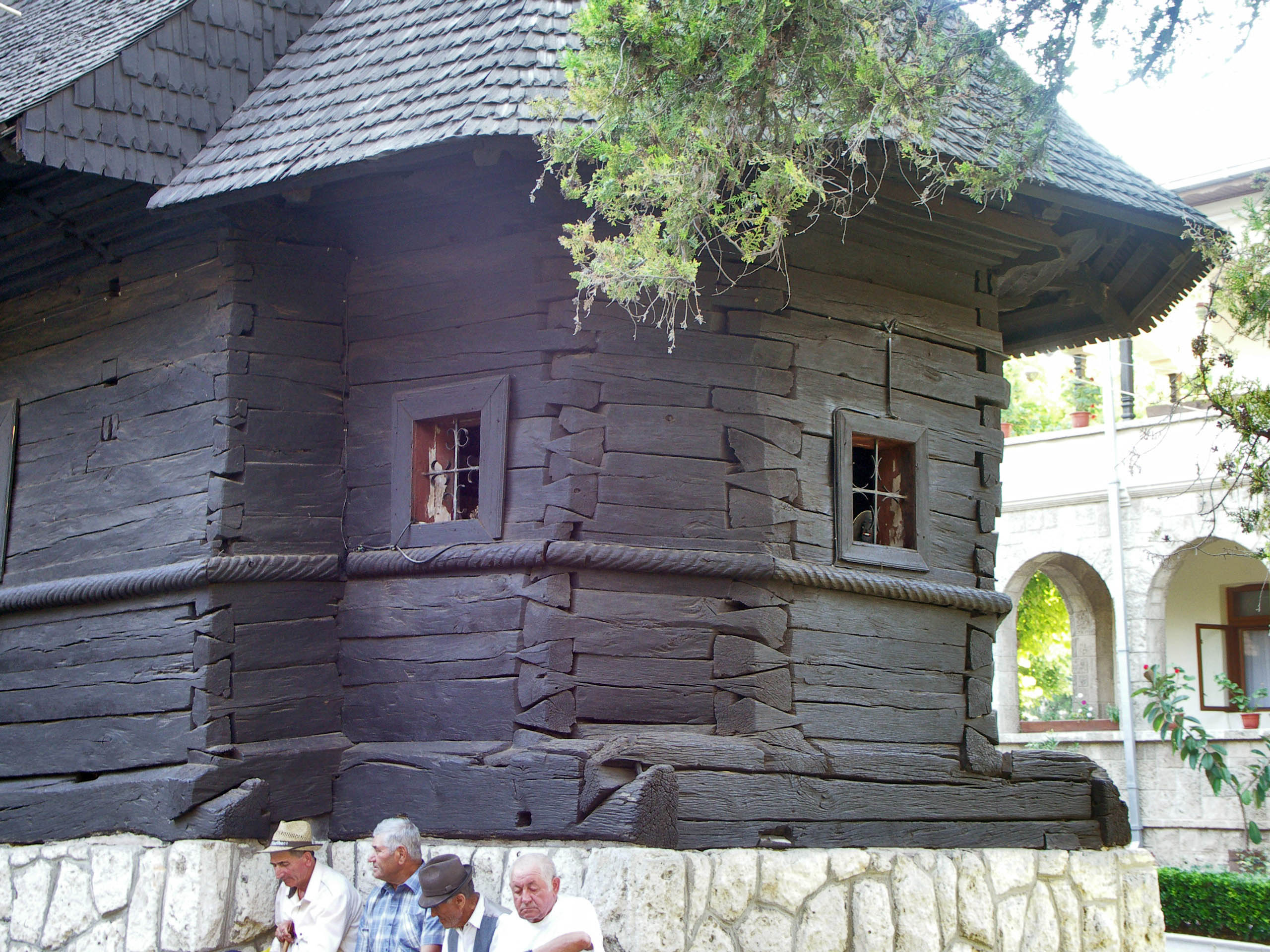 Biserica de lemn din Maioreşti, Mureş, mutată în Techirghiol, Constanţa. Altarul în exterior.